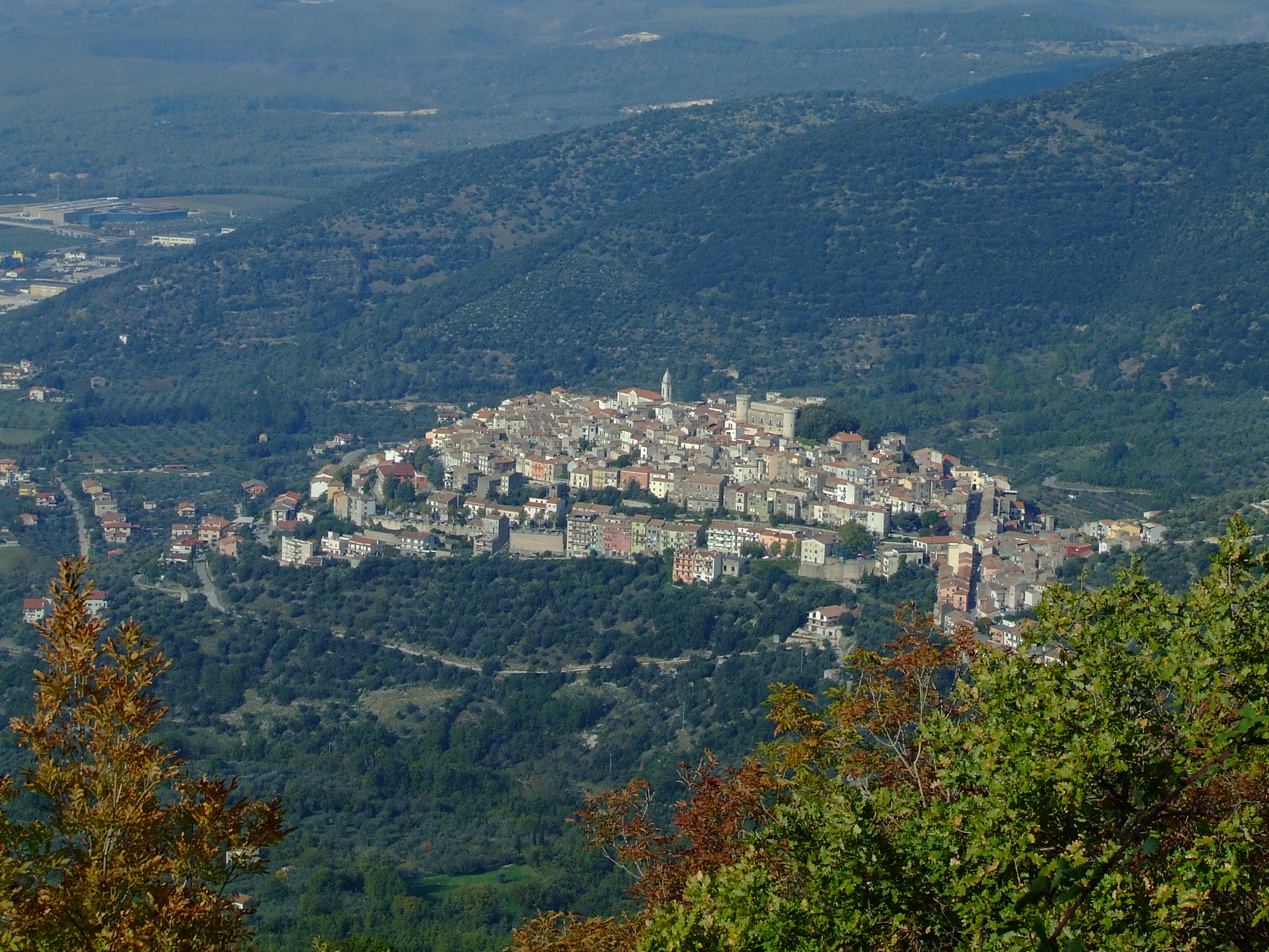 Panorama lato Sud-Ovest